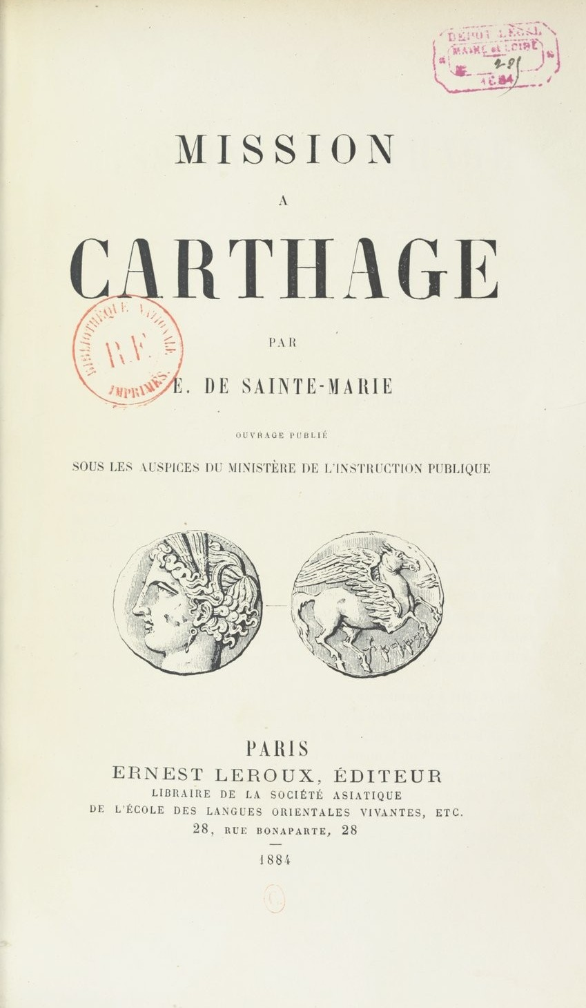 Mission à Carthage 1e de couverture Pricot de Sainte-Marie